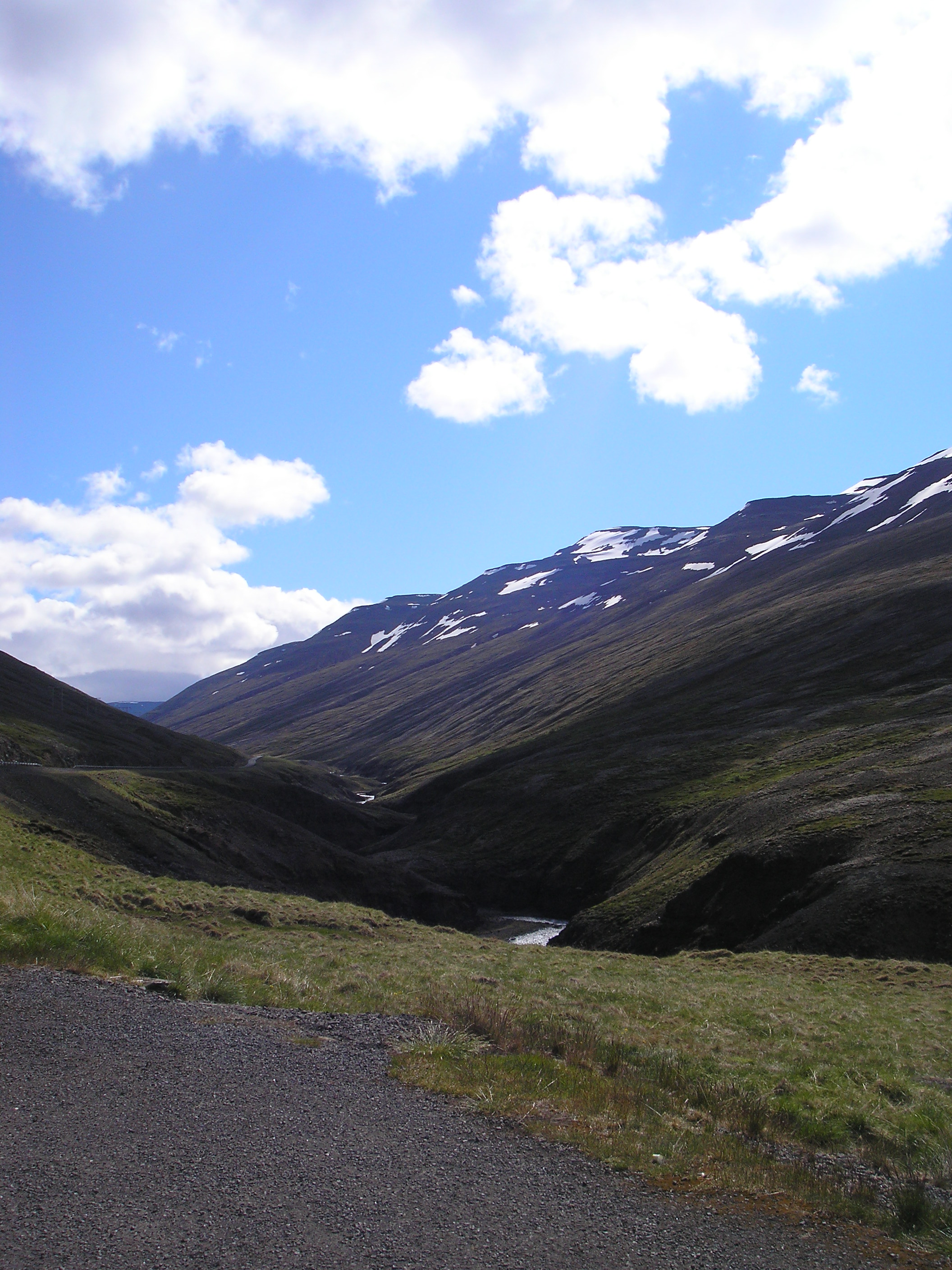 Horft upp Öxnadalsheiði í Austurátt